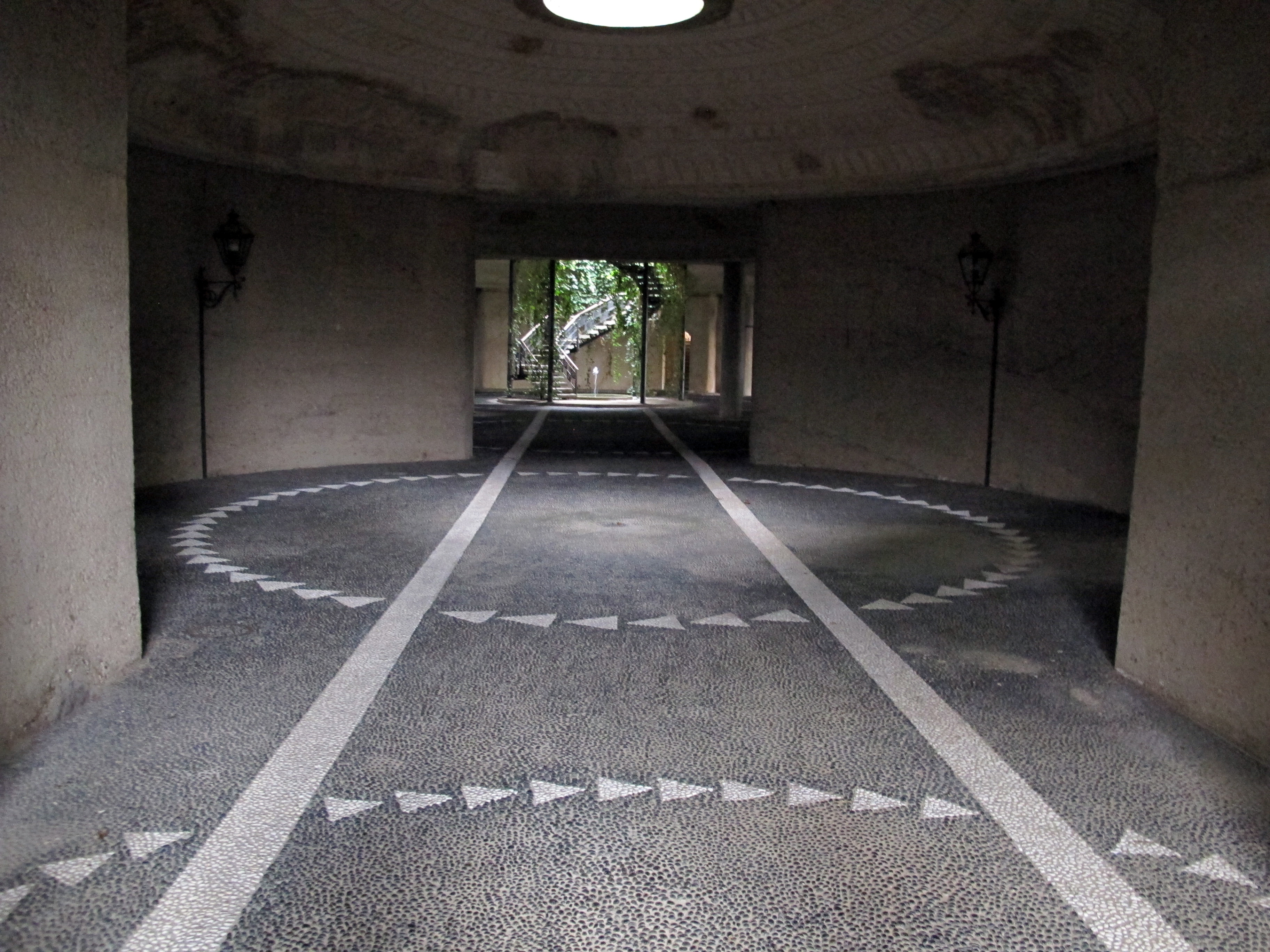 Villa Il Roseto (Firenze)